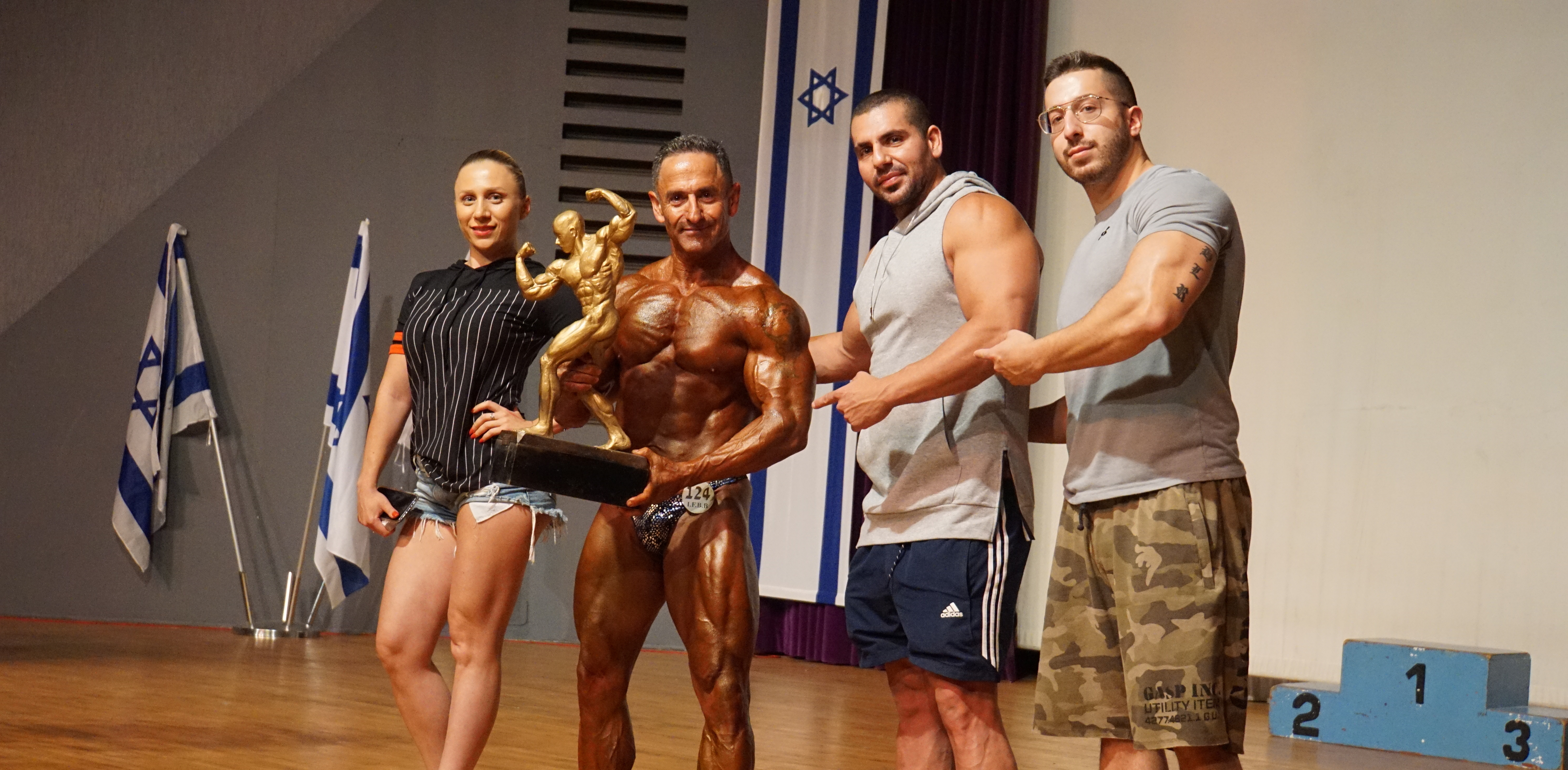 תמונה מהזכיה בתחרות מר ישראל ואלוף האלופים של איגוד IFBB